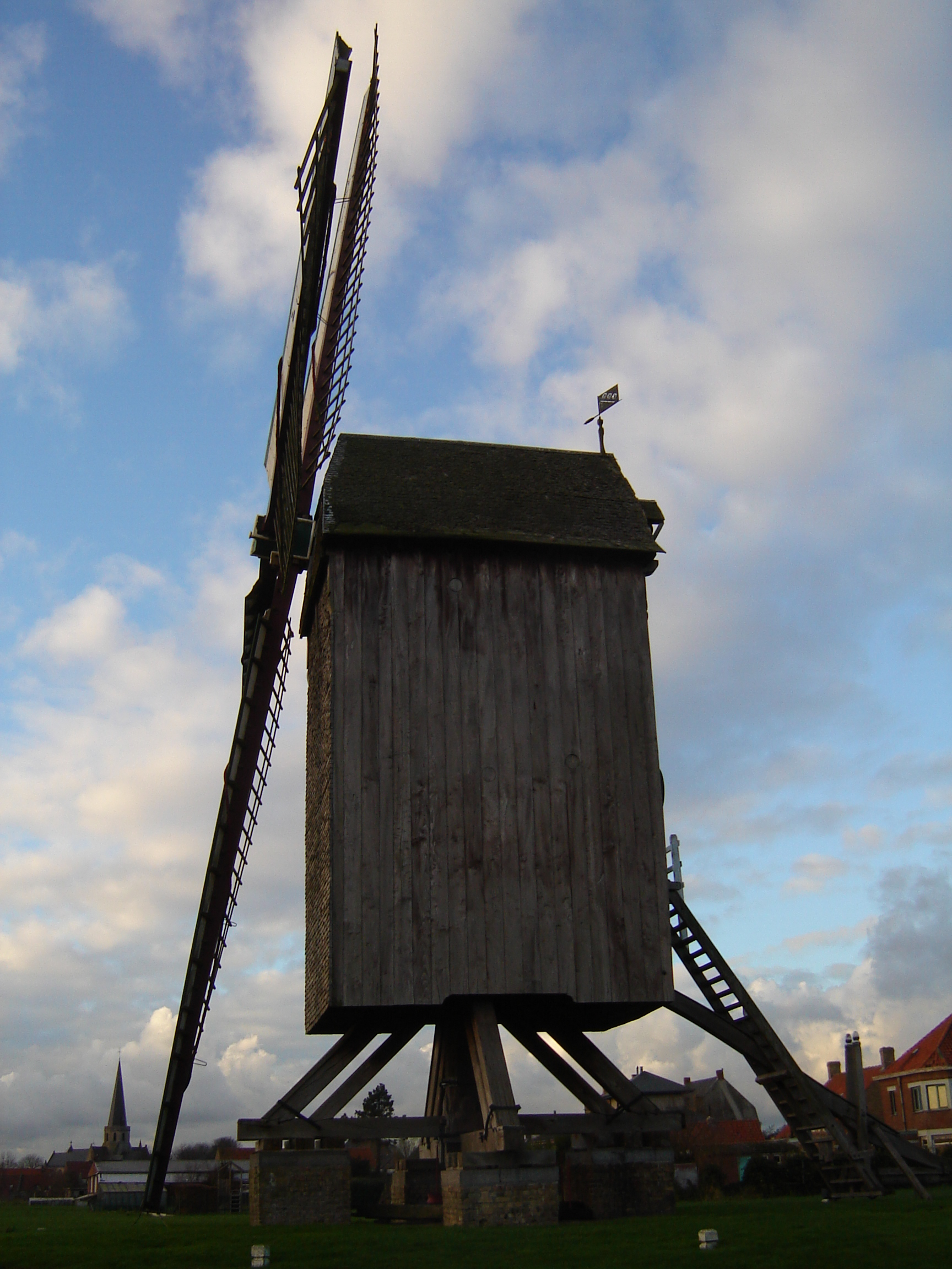 Stalijzermolen in Leisele, Alveringem. Stalijzermolen windmill in Leisele, Alveringem, West-Flanders, Belgium. Old wooden windmill, built in 1804. In the background, the Saint Martins Church